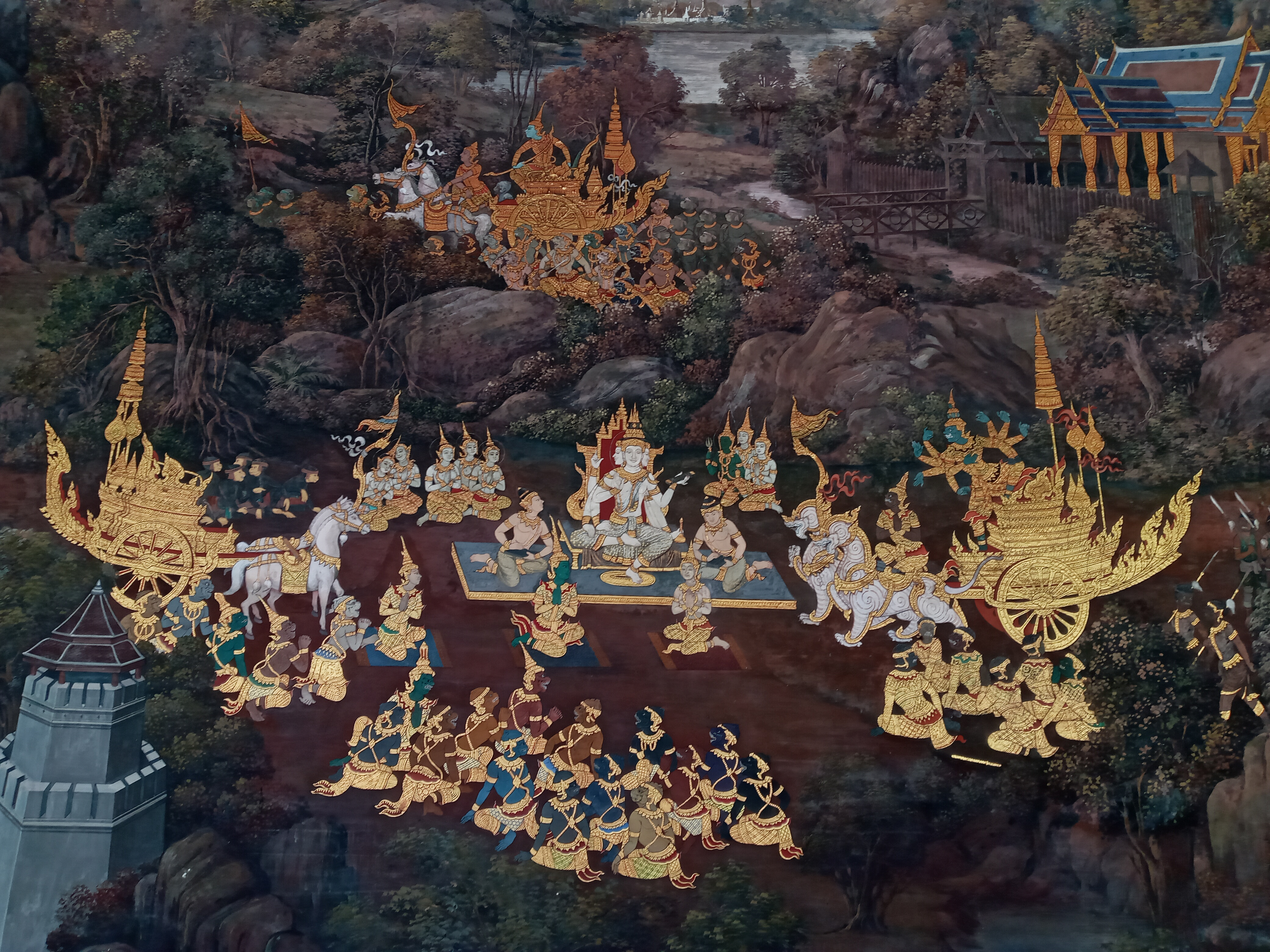 ภาพจิตรกรรมฝาผนัง เรื่อง รามเกียรติ์ ระเบียงวัดพระศรีรัตนศาสดาราม